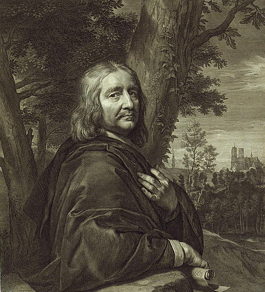 Self-portrait Philippe de Champaigne (1602-1674).